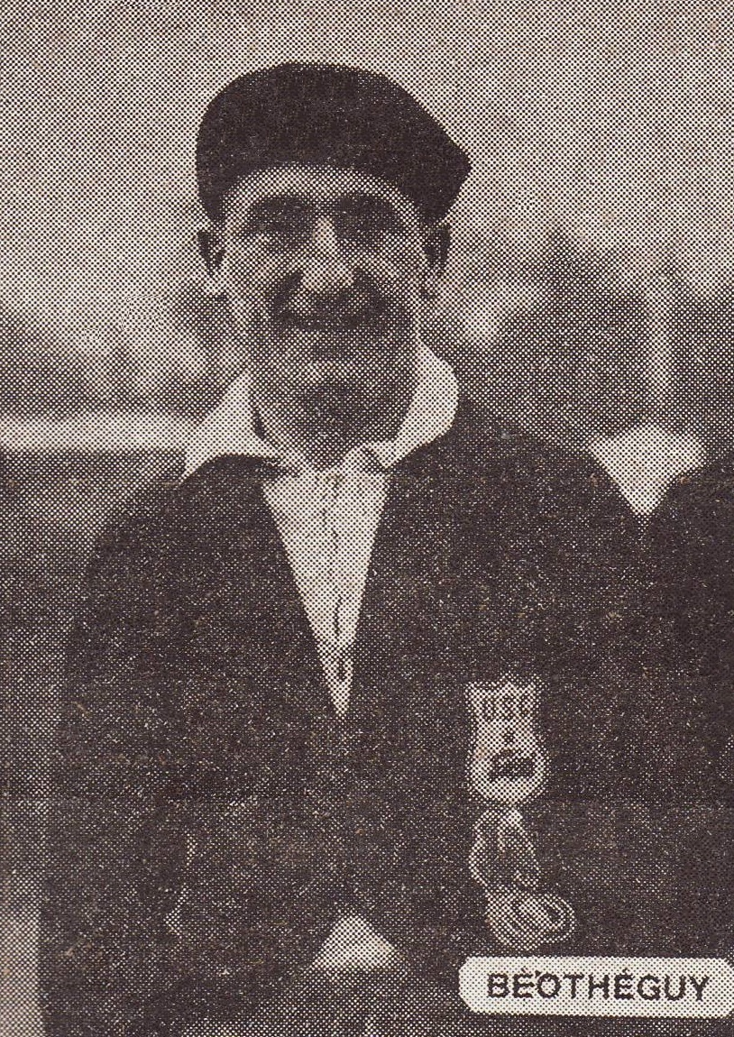 Chocolat Aiguebelle, André Behoteguy - US Cognac